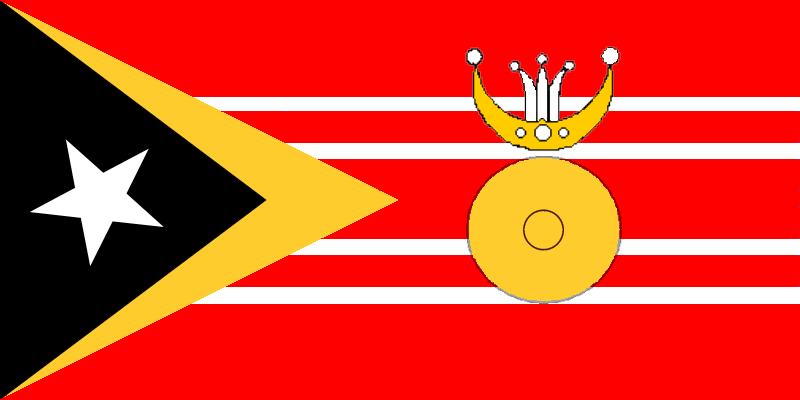 Bandeiro do Manufahi. A coroa Kaibauk e a medalha recordam Dom Boaventura, o grande Liurai, que lutou contra os Portugueses. As quatro riscas brancas representam os subdistritos de Manufahi. O passado sangrento que adverte à Paz é representado pela cor vermelha.